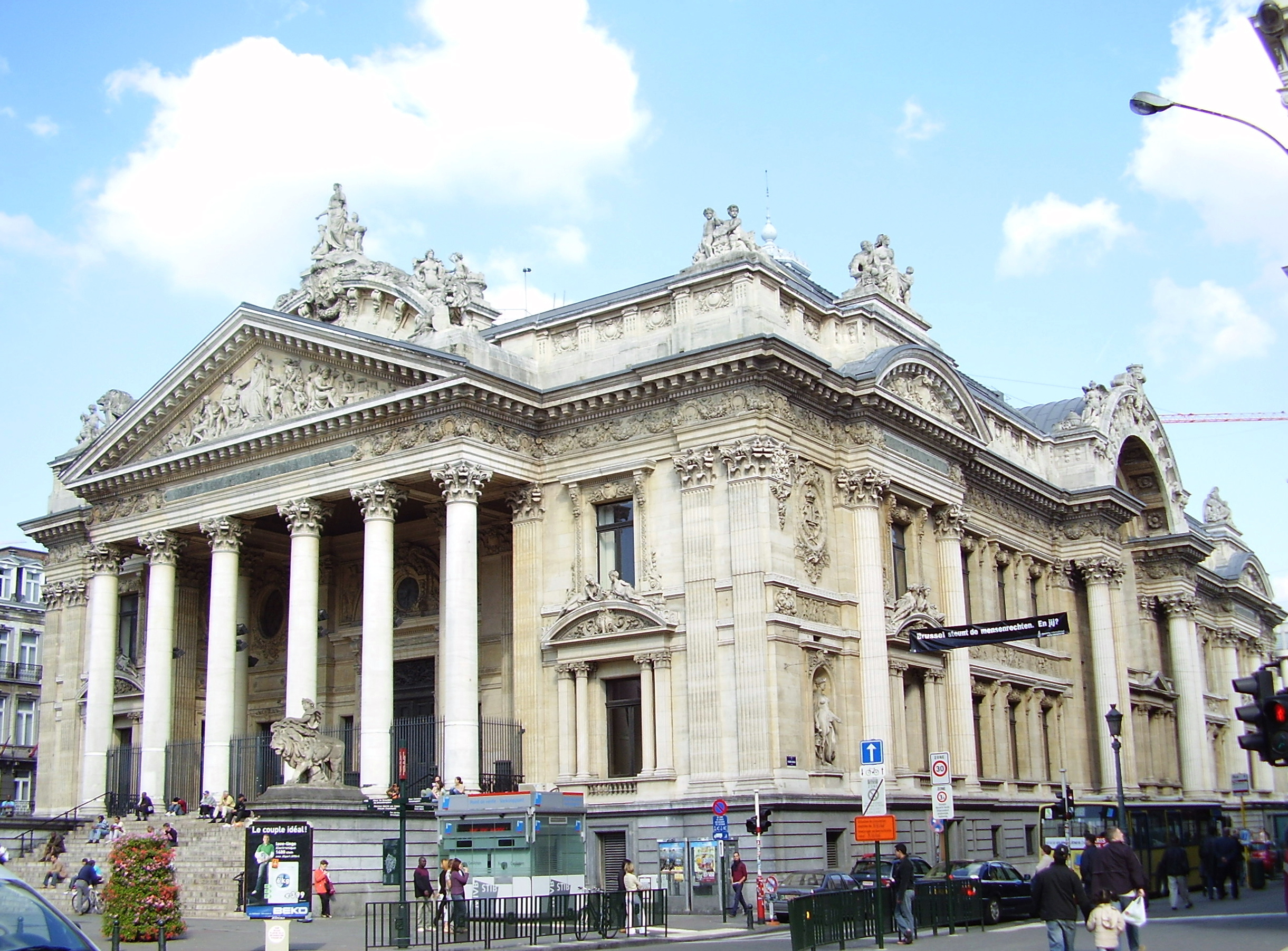 Description: façade de la Bourse de Bruxelles (1873), architecte: Léon-Pierre Suys Author: User:Ben2 Date of creation: 08 juin 2006 Source: Photo personnelle